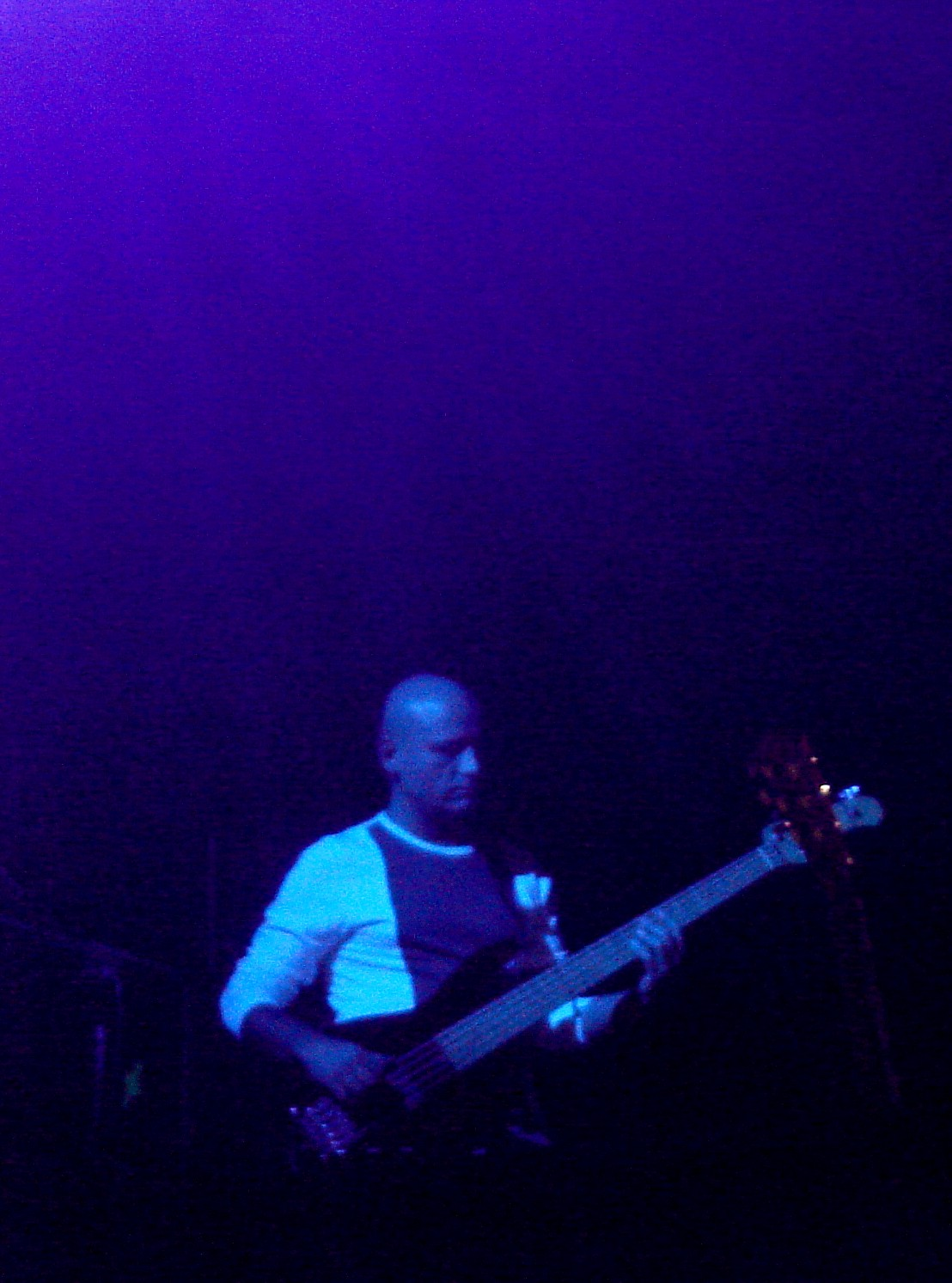 Pierluigi Mingotti al concerto gucciniano del 12-12-2008 a Pordenone